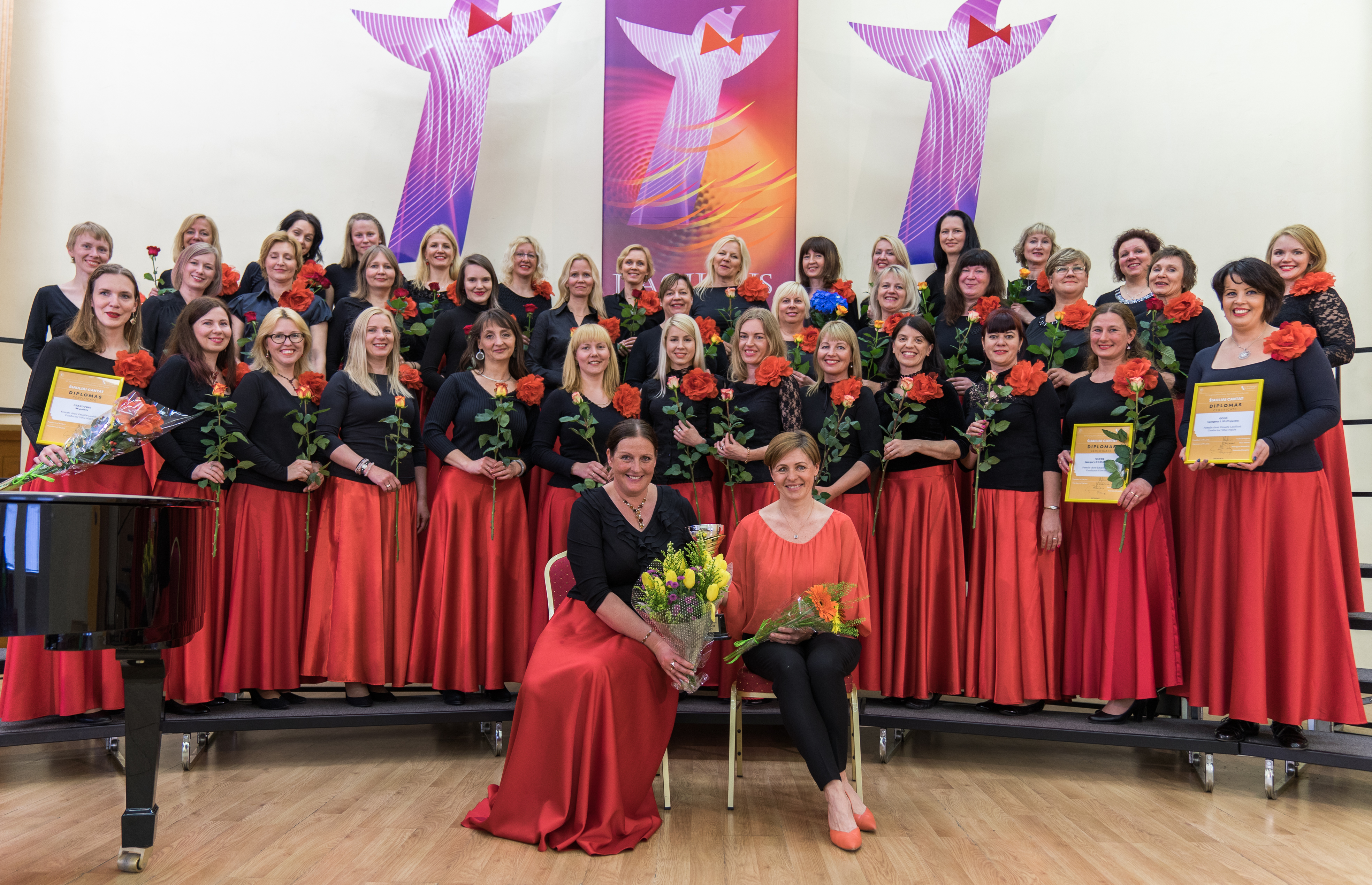 Naiskoor Emajõe Laulikud. 2017: Šiauliai (Leedu), Šiauliai Cantat